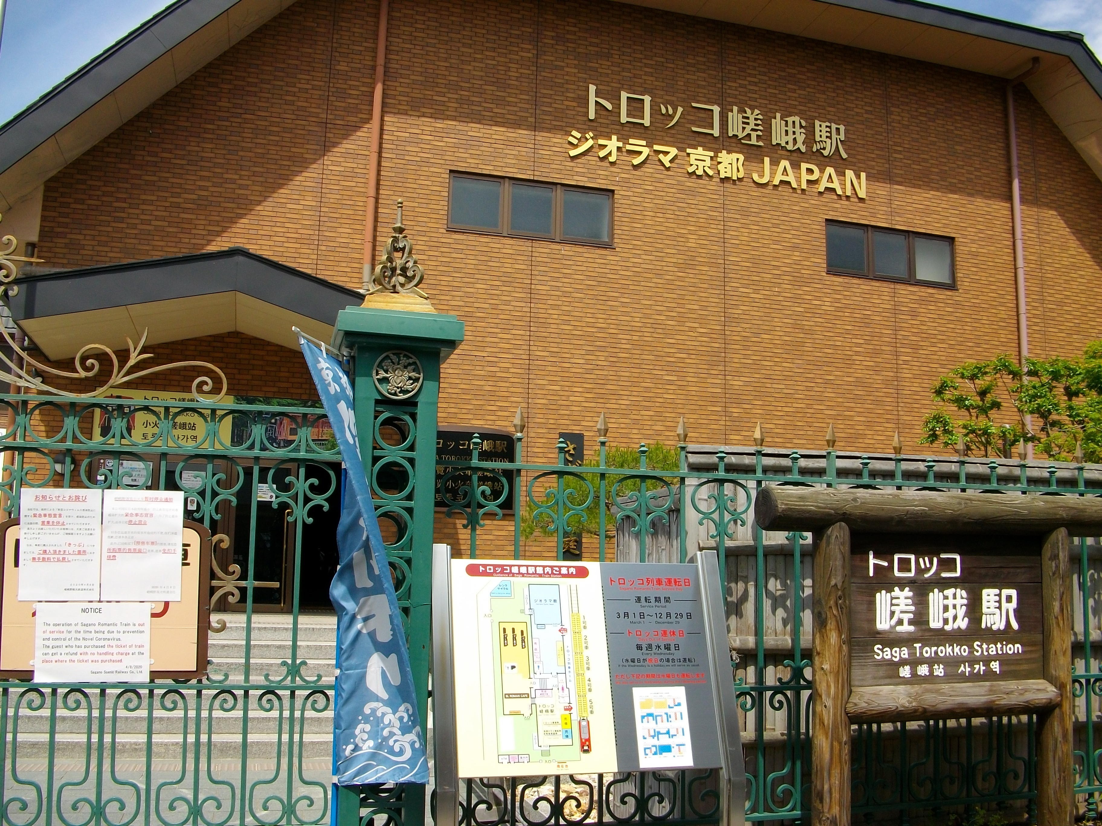 新型コロナウイルスで休業閉鎖した嵯峨野観光鉄道のトロッコ嵯峨駅